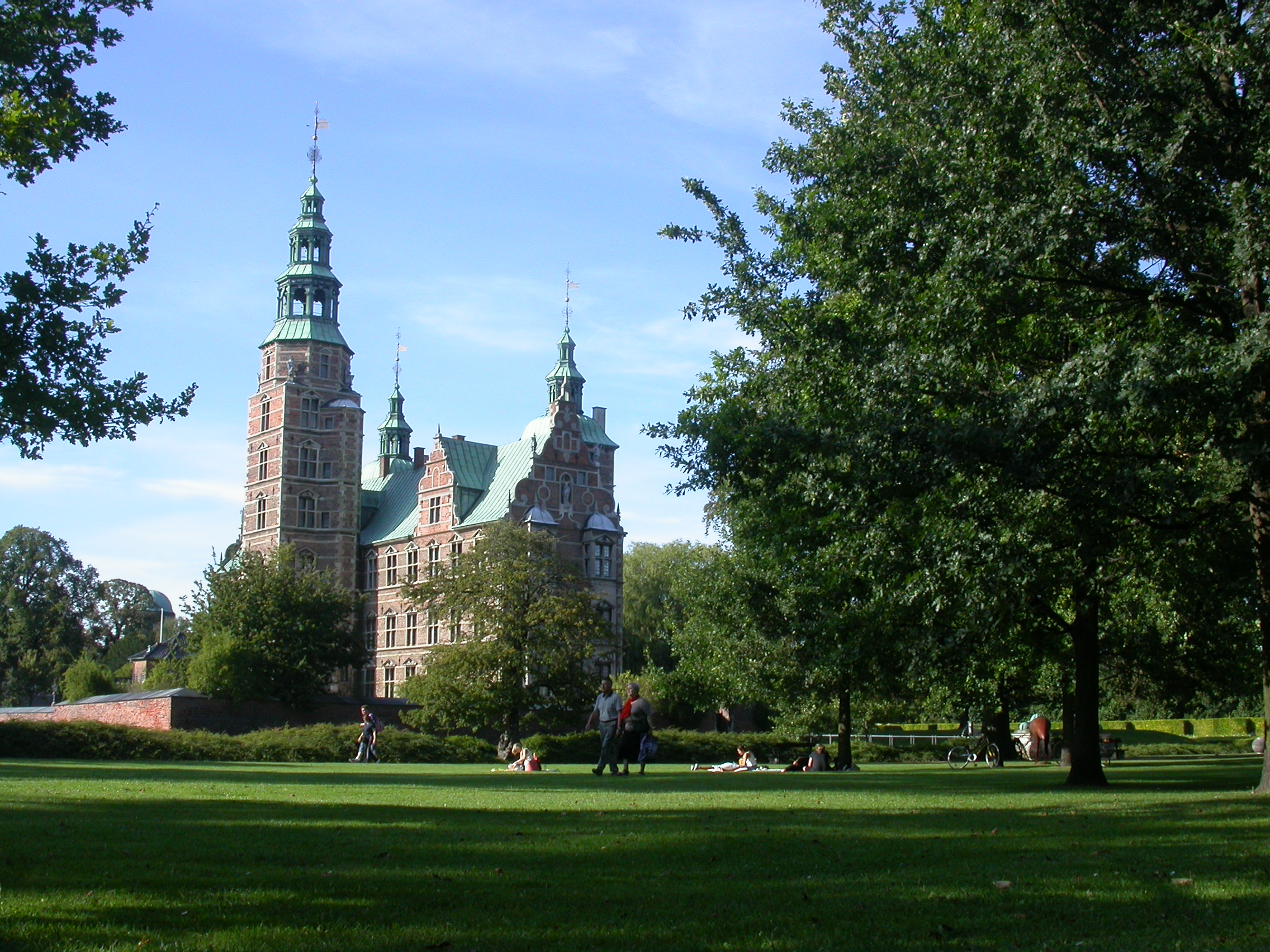 Rosenborg Castle in Kongens Have in central Copenhagen, Denmark